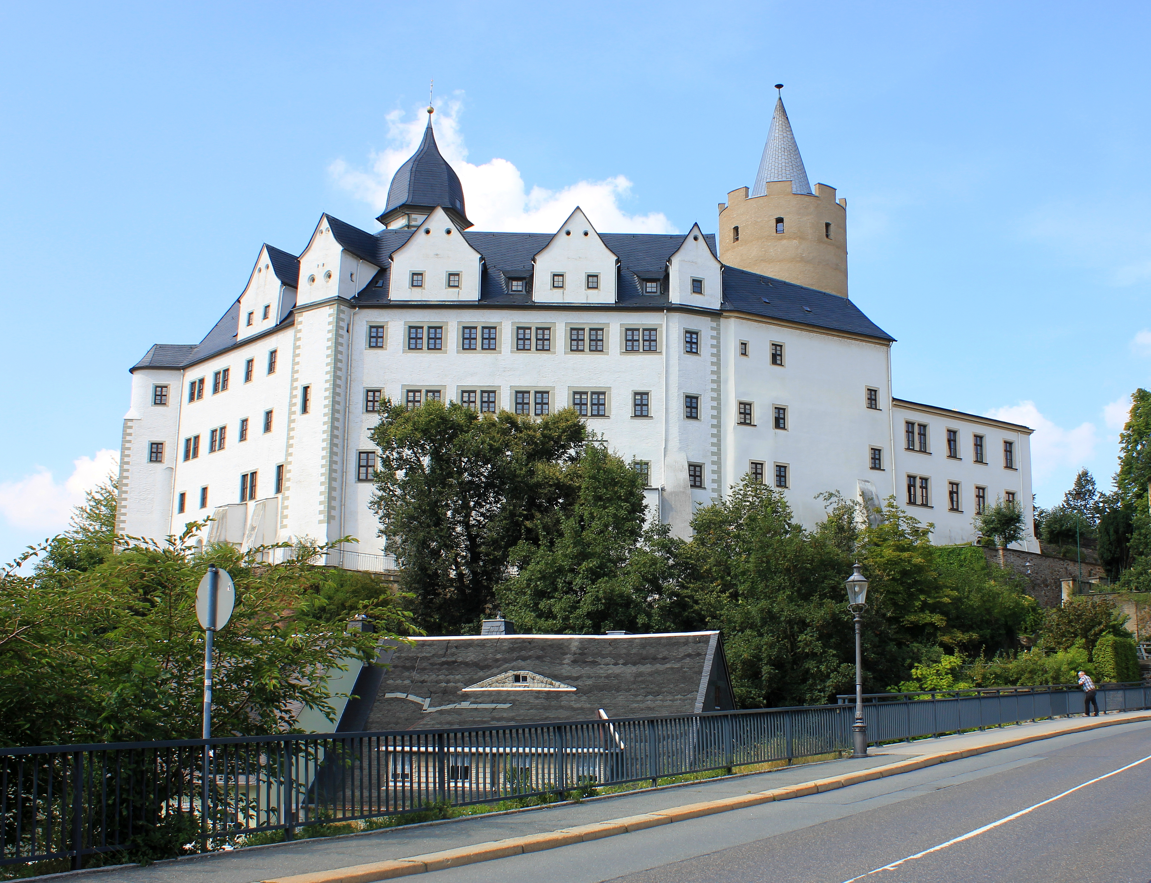 Schloss Wildeck in Zschopau. Sachsen.